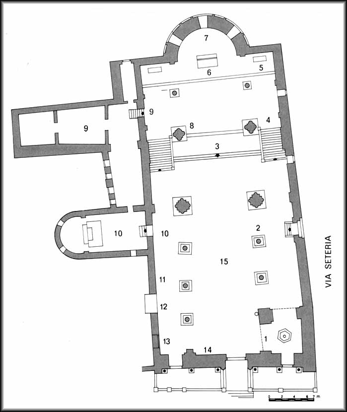 Plan masse de la Pieve d'Arezzo Mappa della chiesa di Santa Maria della Pieve ad Arezzo.